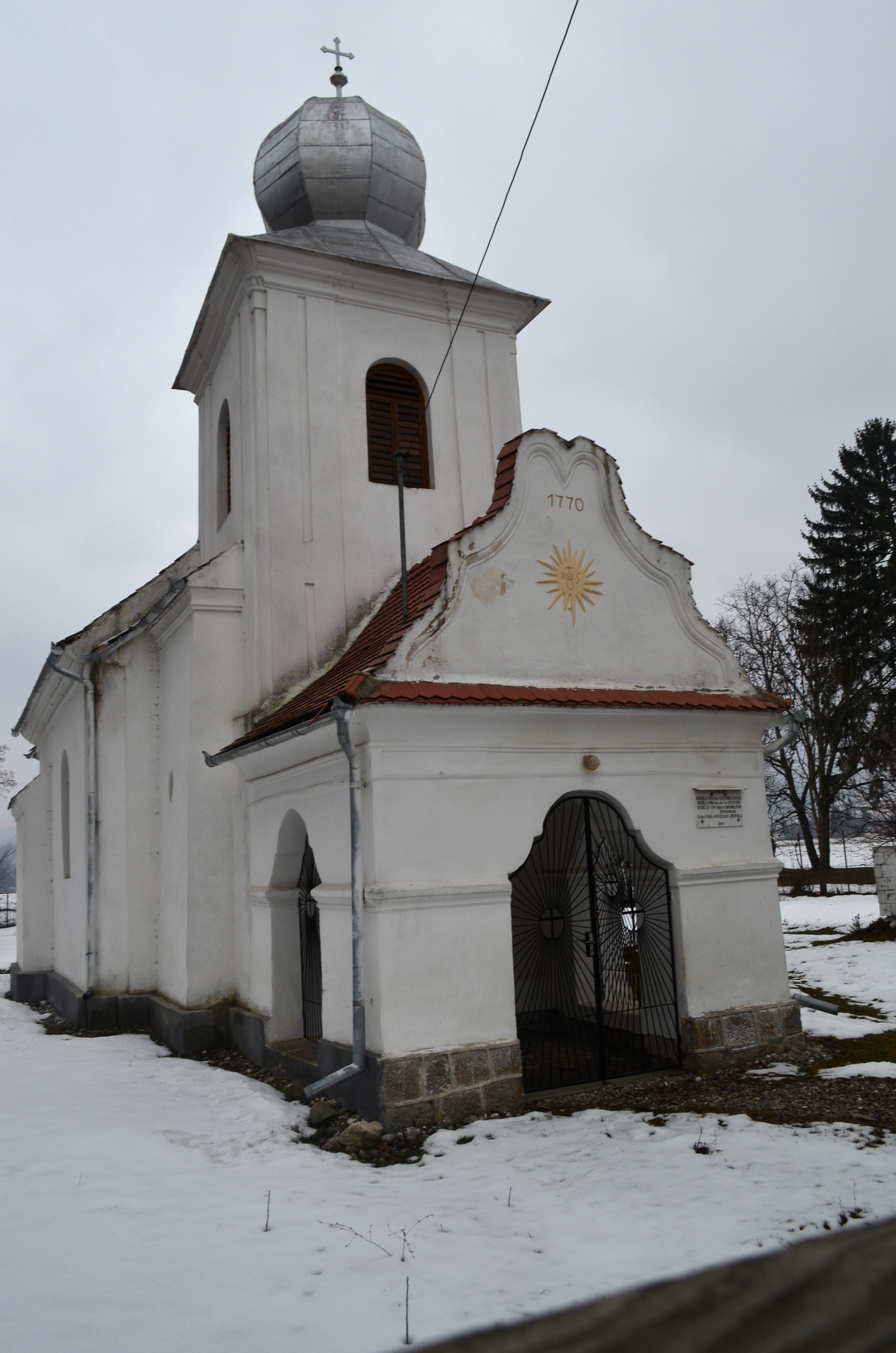 Capela de lângă Castelul Beldy Ladislau, Budila 02